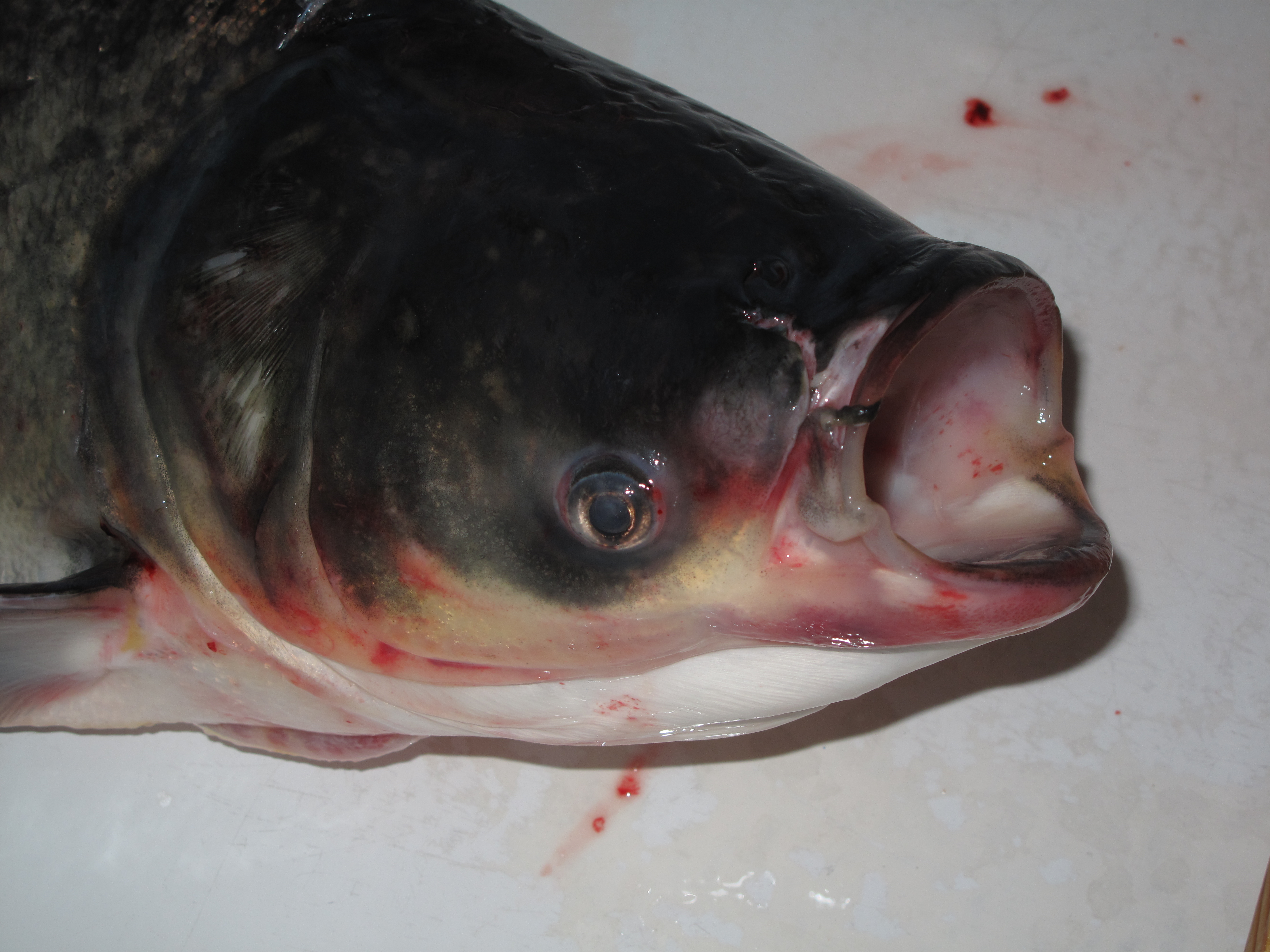 Tolstolobec pestrý, hlava